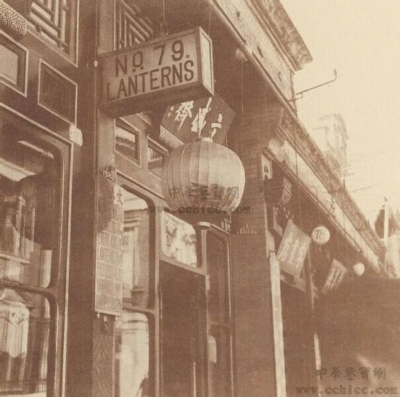 中文（香港）: 1911年北京的燈籠